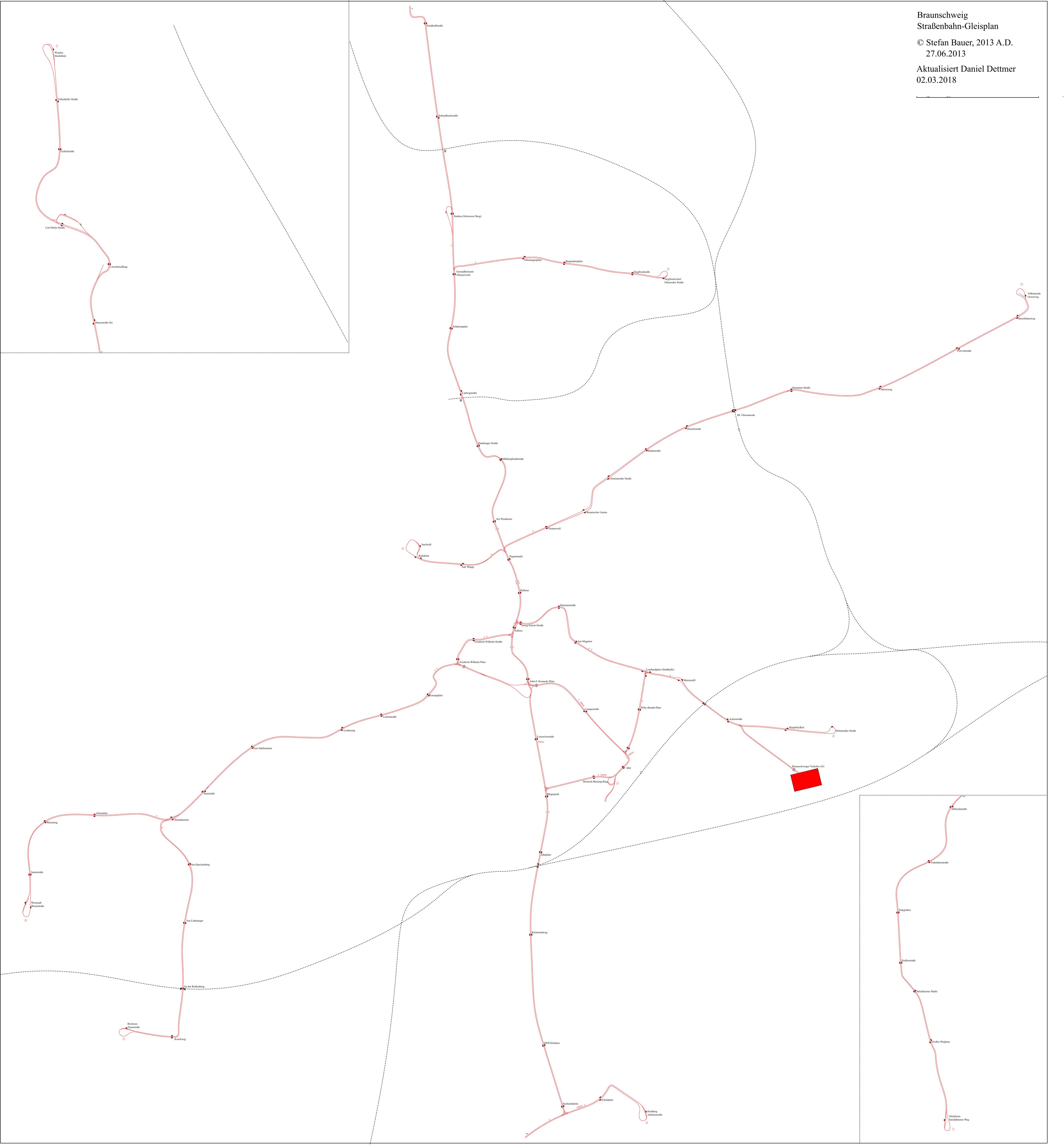 Straßenbahn-Gleisplan Braunschweig 2018